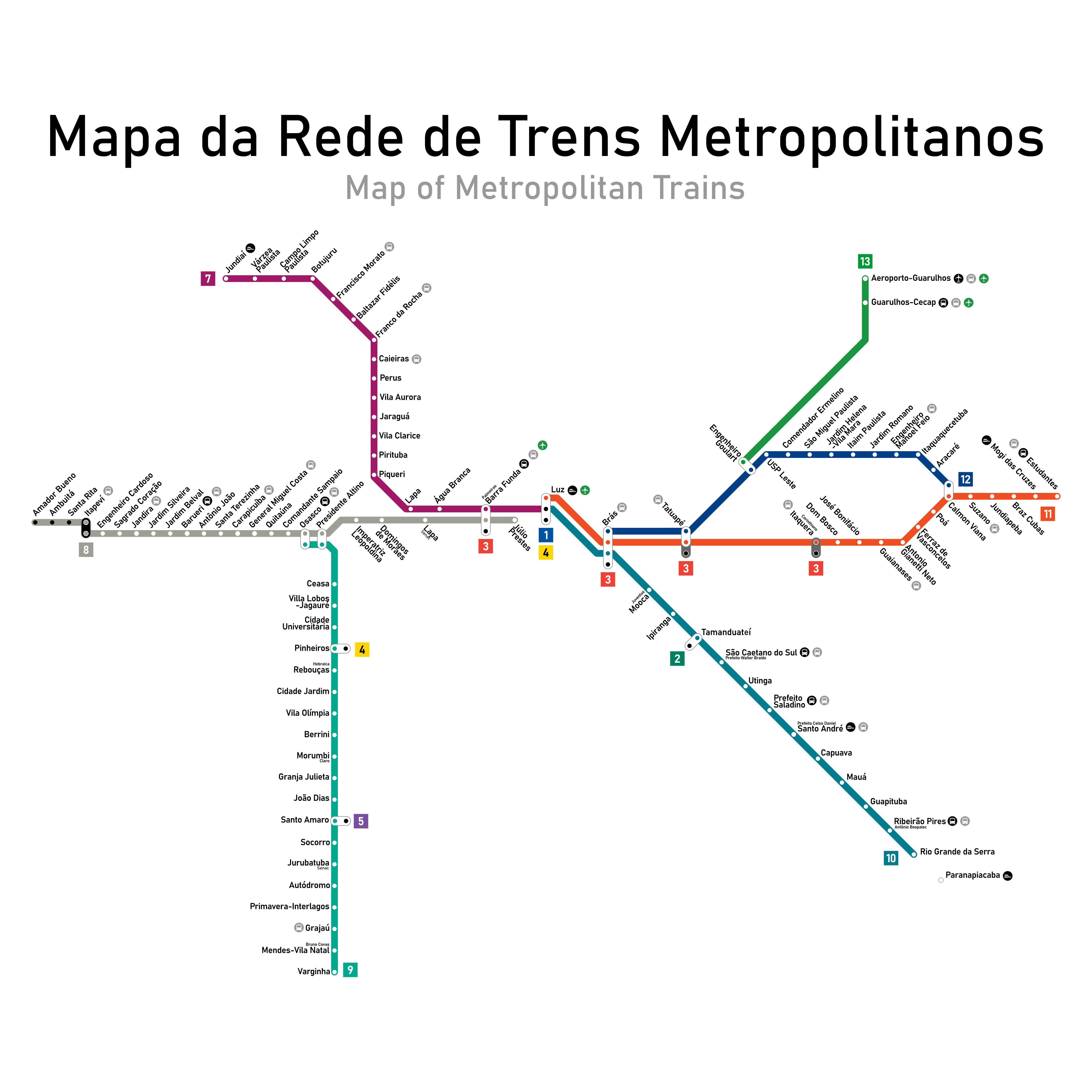 Mapa de Rede de Trens Metropolitanos de São Paulo, CPTM